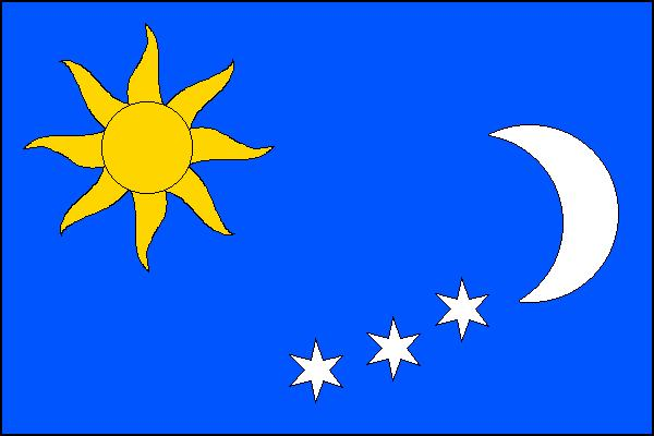 Vlajka obce Světlá Hora